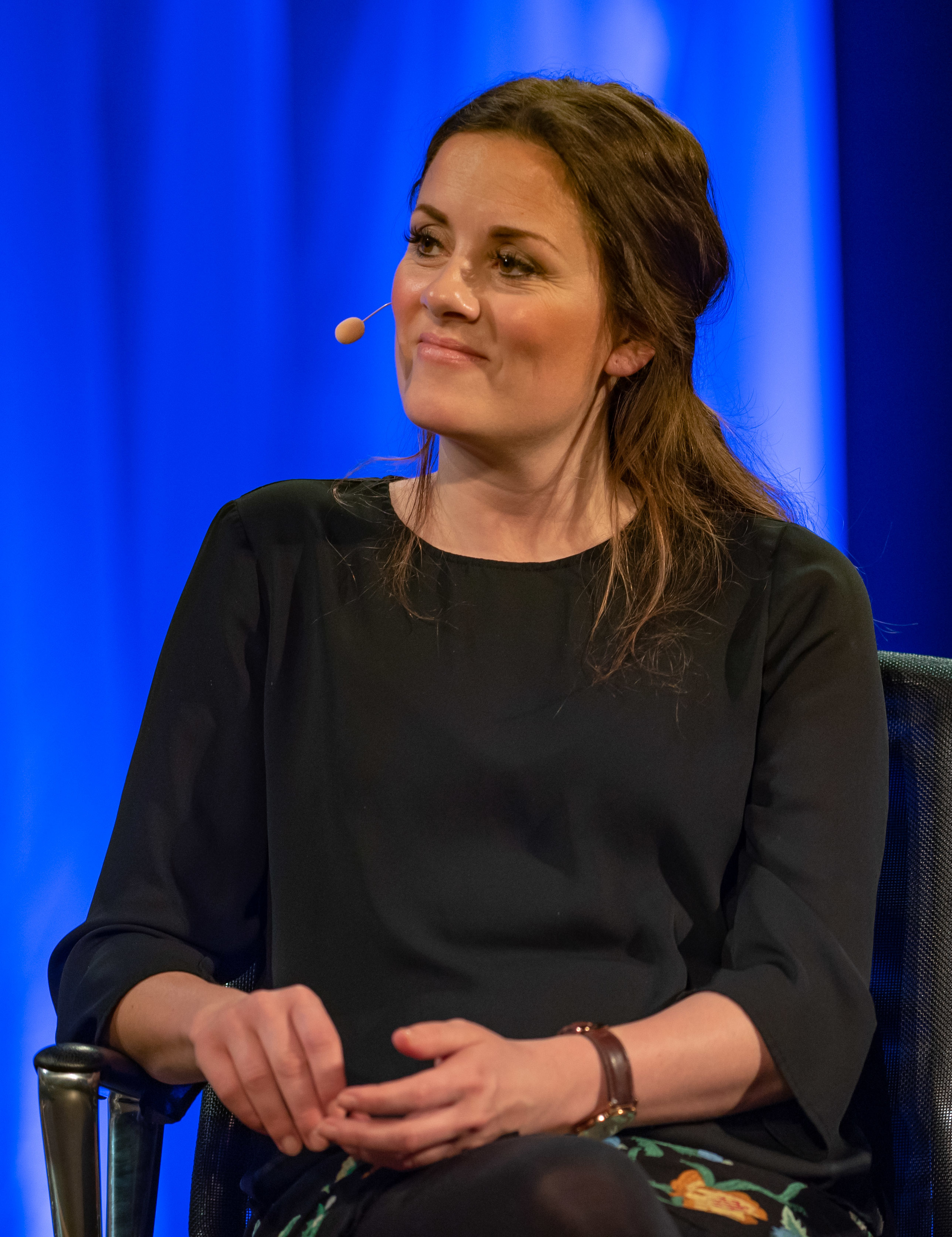 Vikingane - Tospråklig humorsuksess. Kristine Riis, Kåre Conradi.